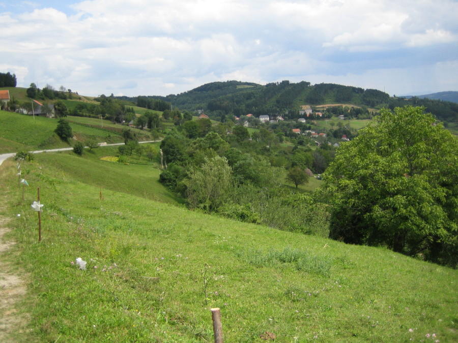 село Катићи